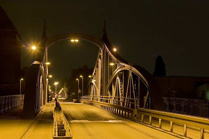 Drehbrücke in Krefeld-Linn, Hafenstraße, Denkmal Nr. 613 This image shows a heritage building in Germany, located in the North Rhine-Westphalian city Krefeld (no. 613).